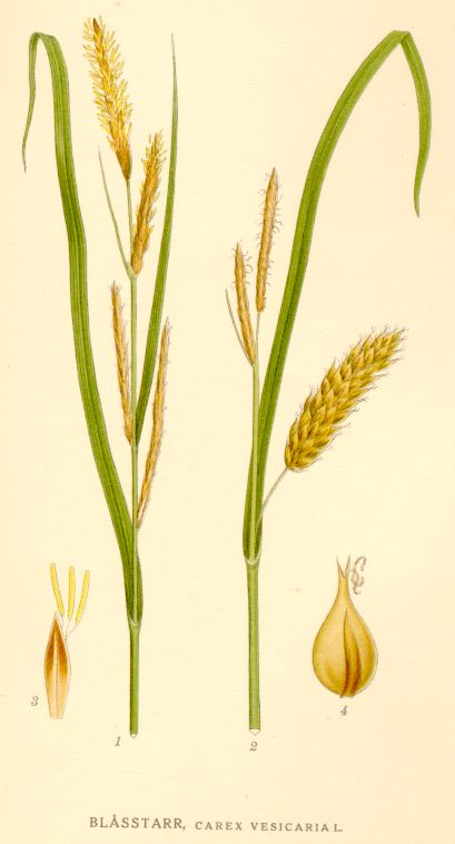 Carex vesicaria